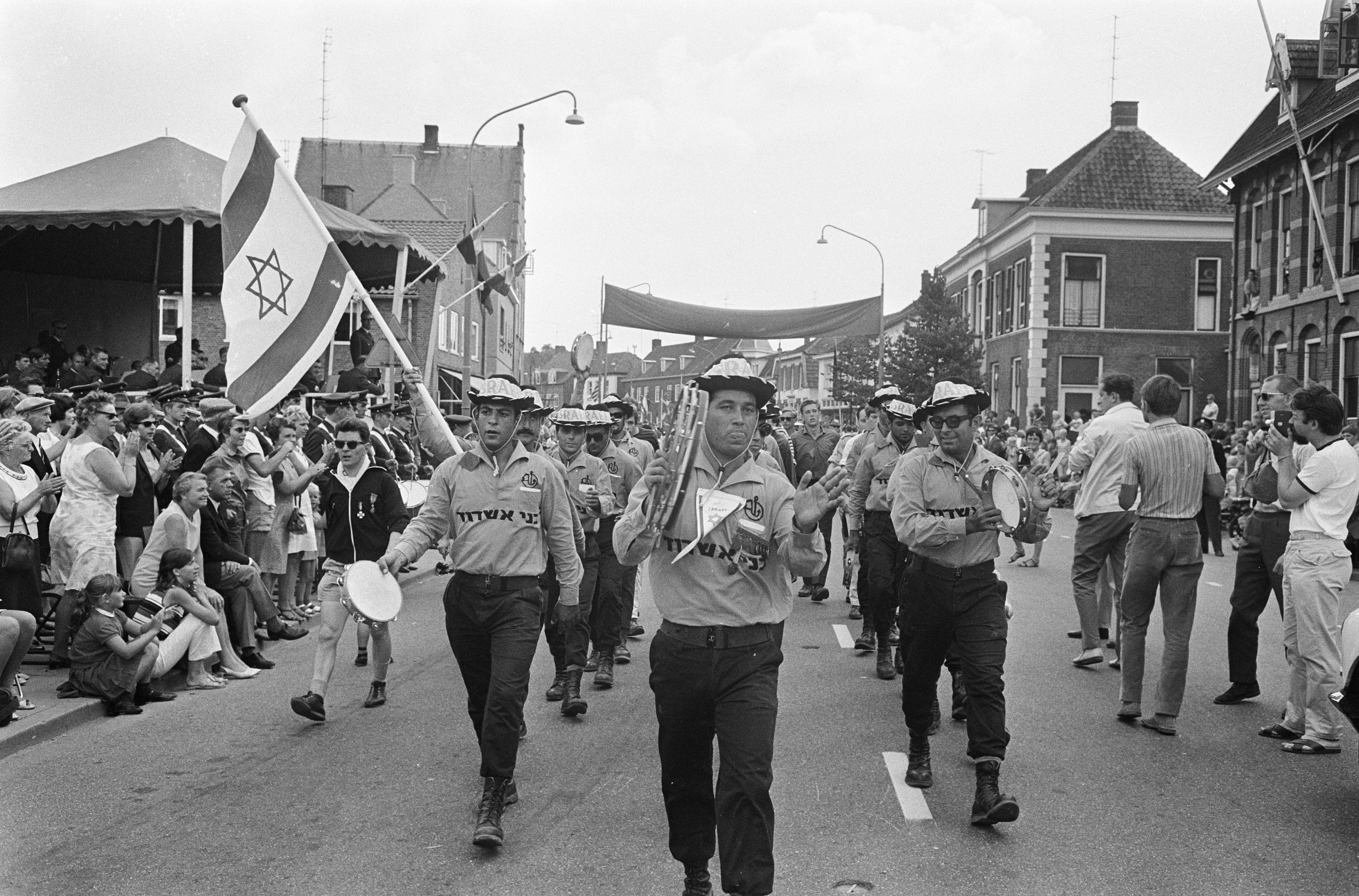 Collectie / Archief : Fotocollectie Anefo Reportage / Serie : [ onbekend ] Beschrijving : Eerste dag Vierdaagse Nijmegen. Israelische burgers Datum : 25 juli 1967 Locatie : Nijmegen Trefwoorden : VIERDAAGSE Fotograaf : Koch, Eric / Anefo Auteursrechthebbende : Nationaal Archief Materiaalsoort : Negatief (zwart/wit) Nummer archiefinventaris : bekijk toegang 2.24.01.05 Bestanddeelnummer : 920-5385